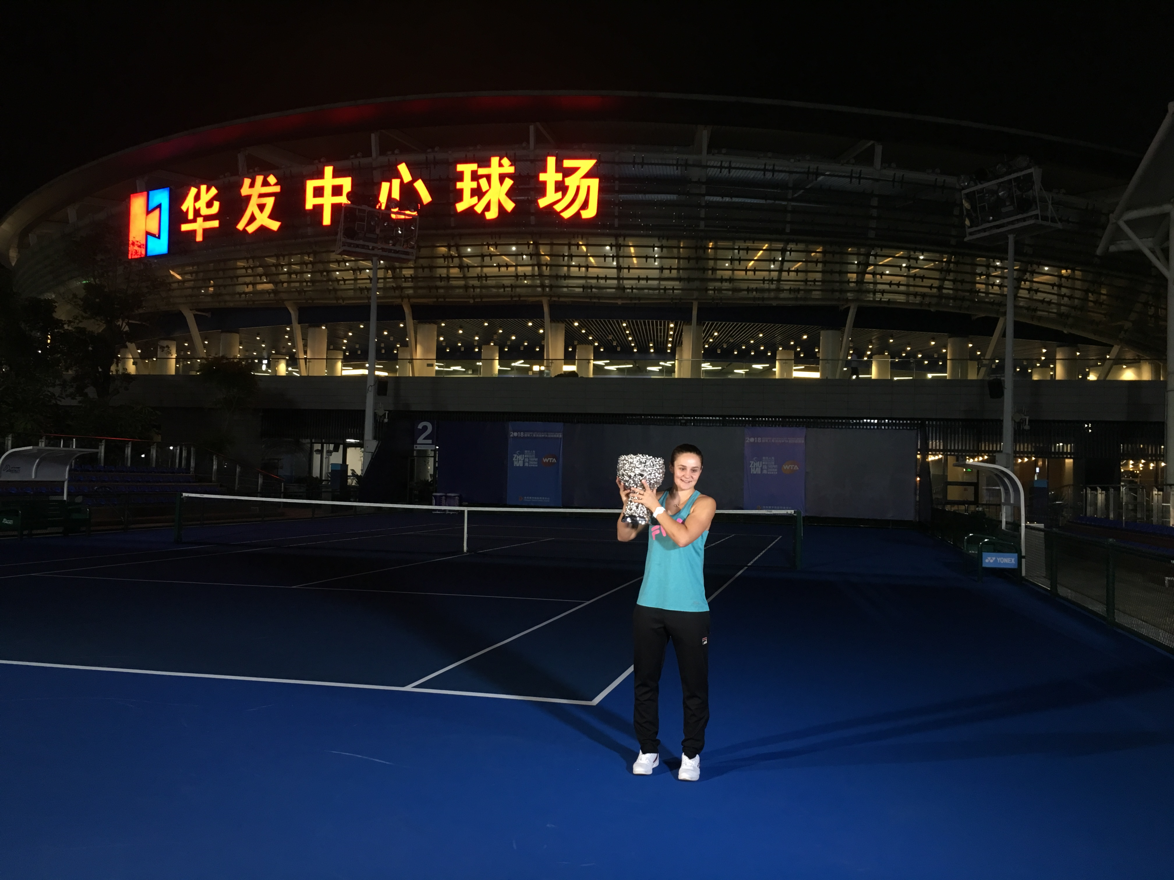 中文（中国大陆）: 2018珠海WTA超级精英赛女单冠军阿什利·巴蒂